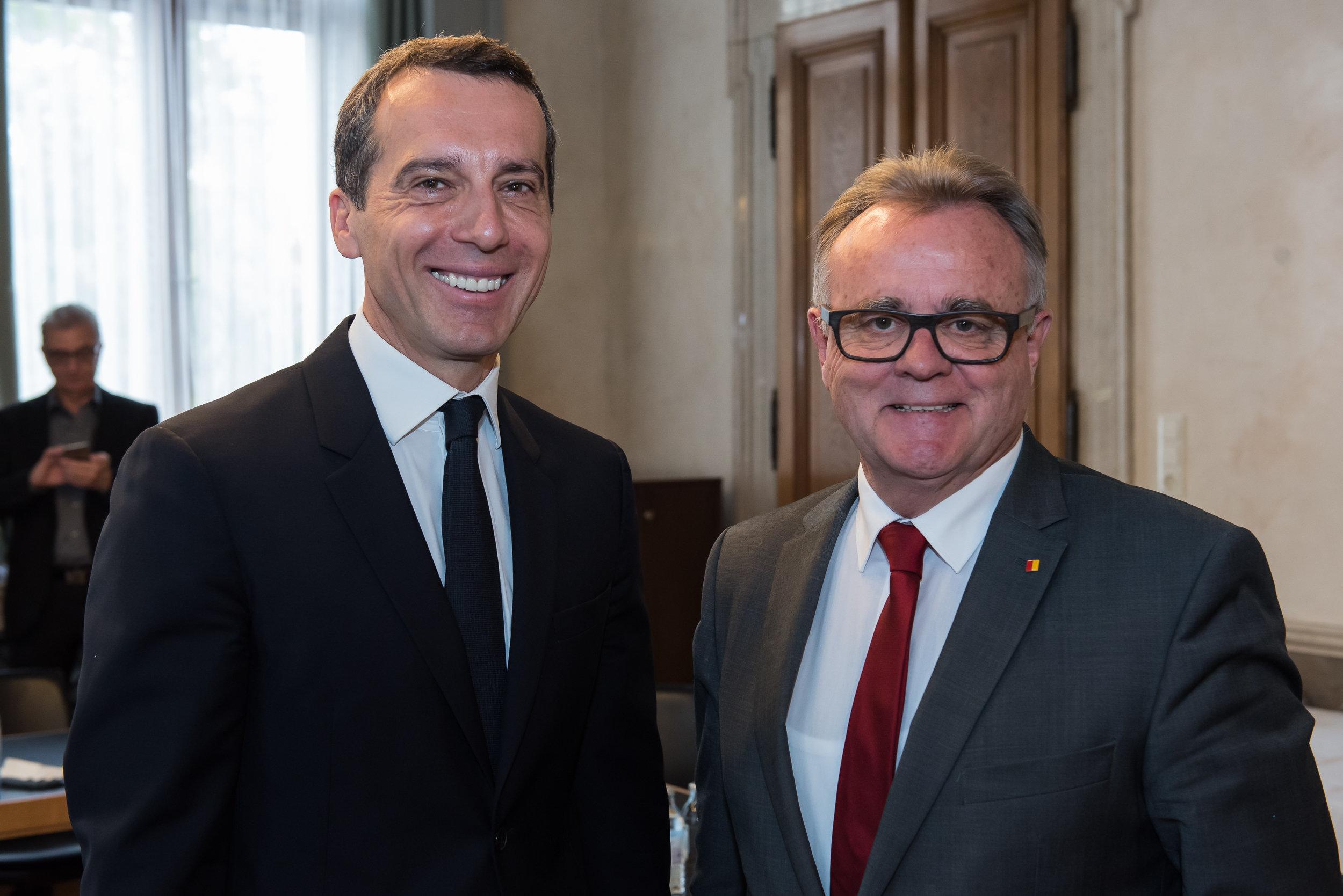 Christian Kern und Hans Niessl vor der Präsidiumssitzung am 17.5.2016